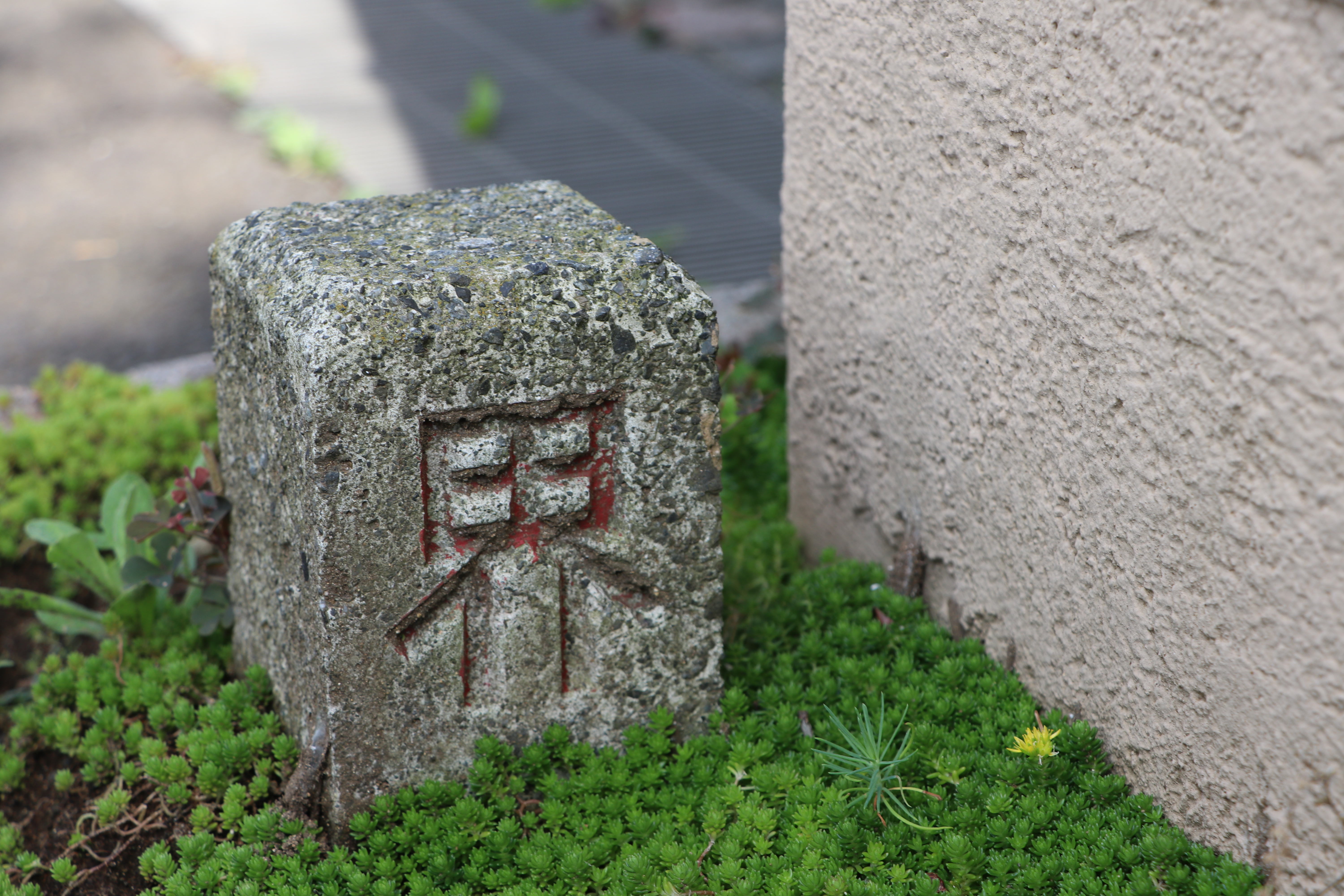 日本語で境界を表す「界」の文字が刻まれた境界標